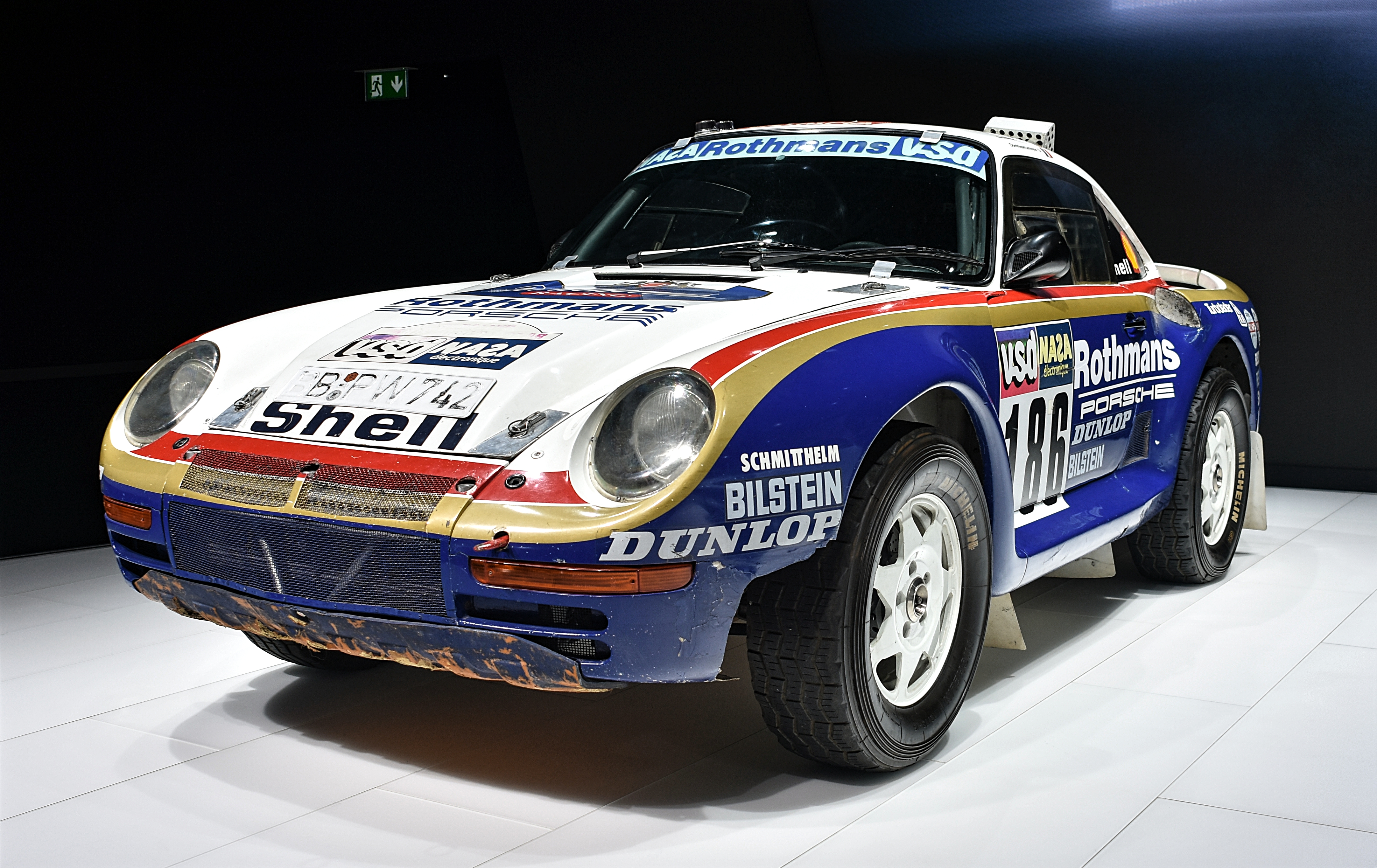 Porsche at IAA 2017